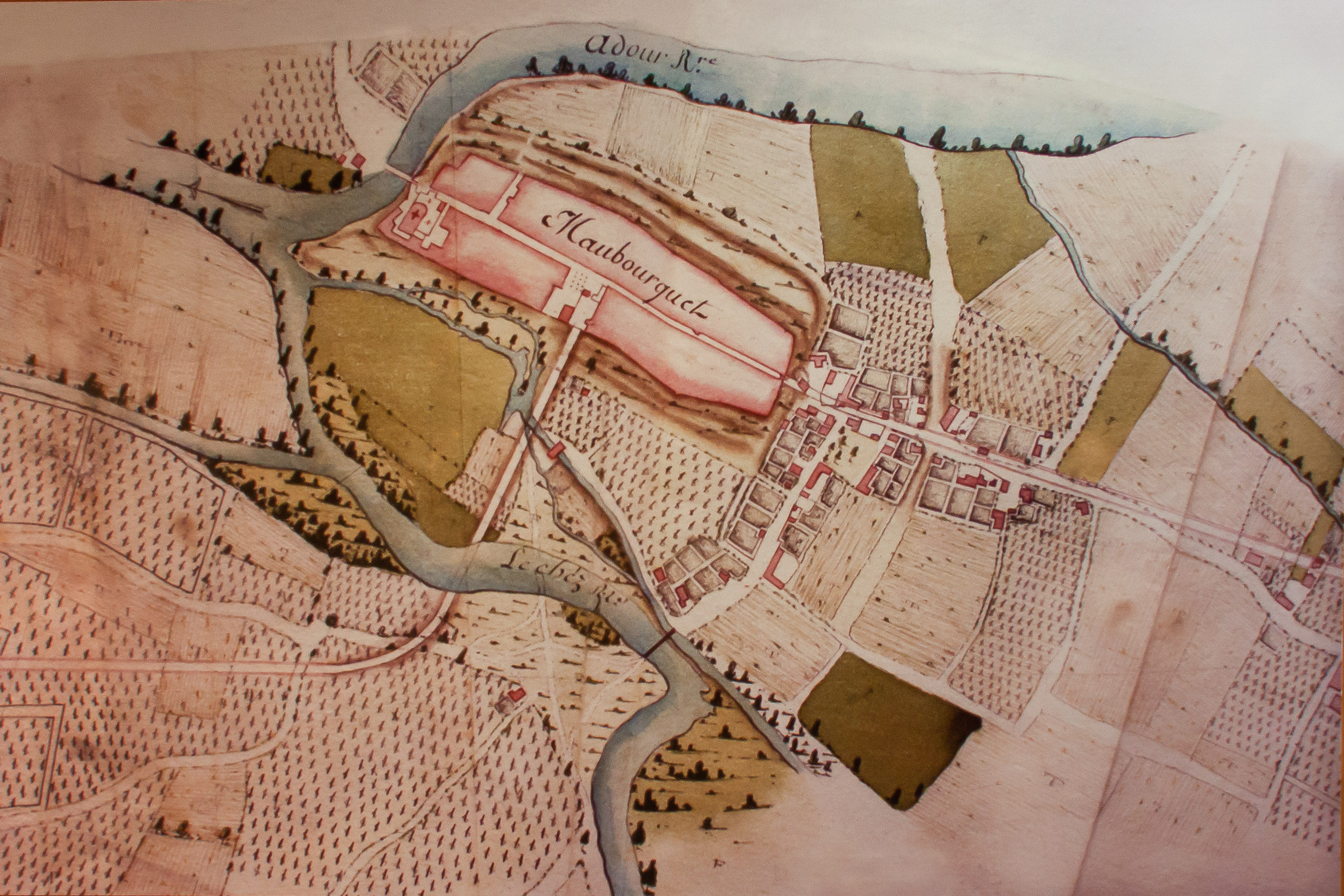 Plan de Maubourguet vers 1760 / Maubourguet / Hautes-Pyrénées / France